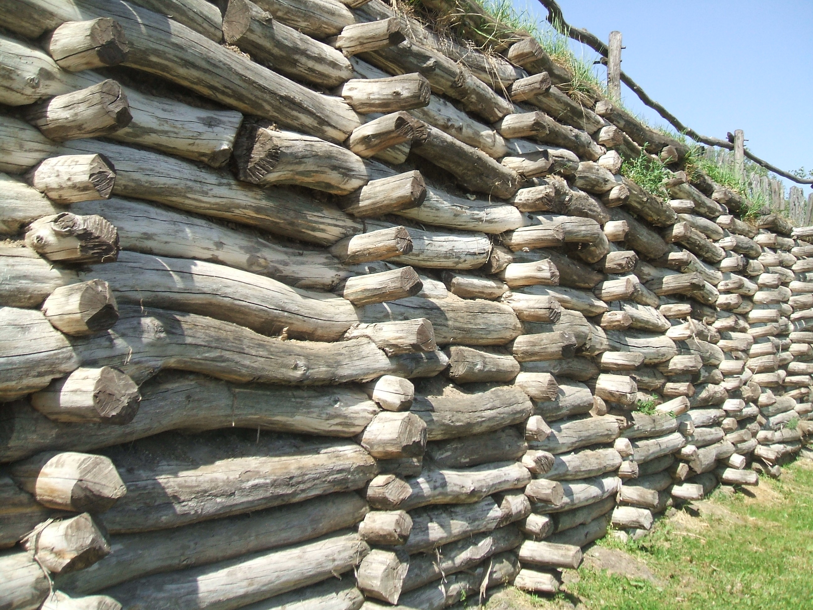 Widok na mur obronny w Biskupinie od wewnątrz